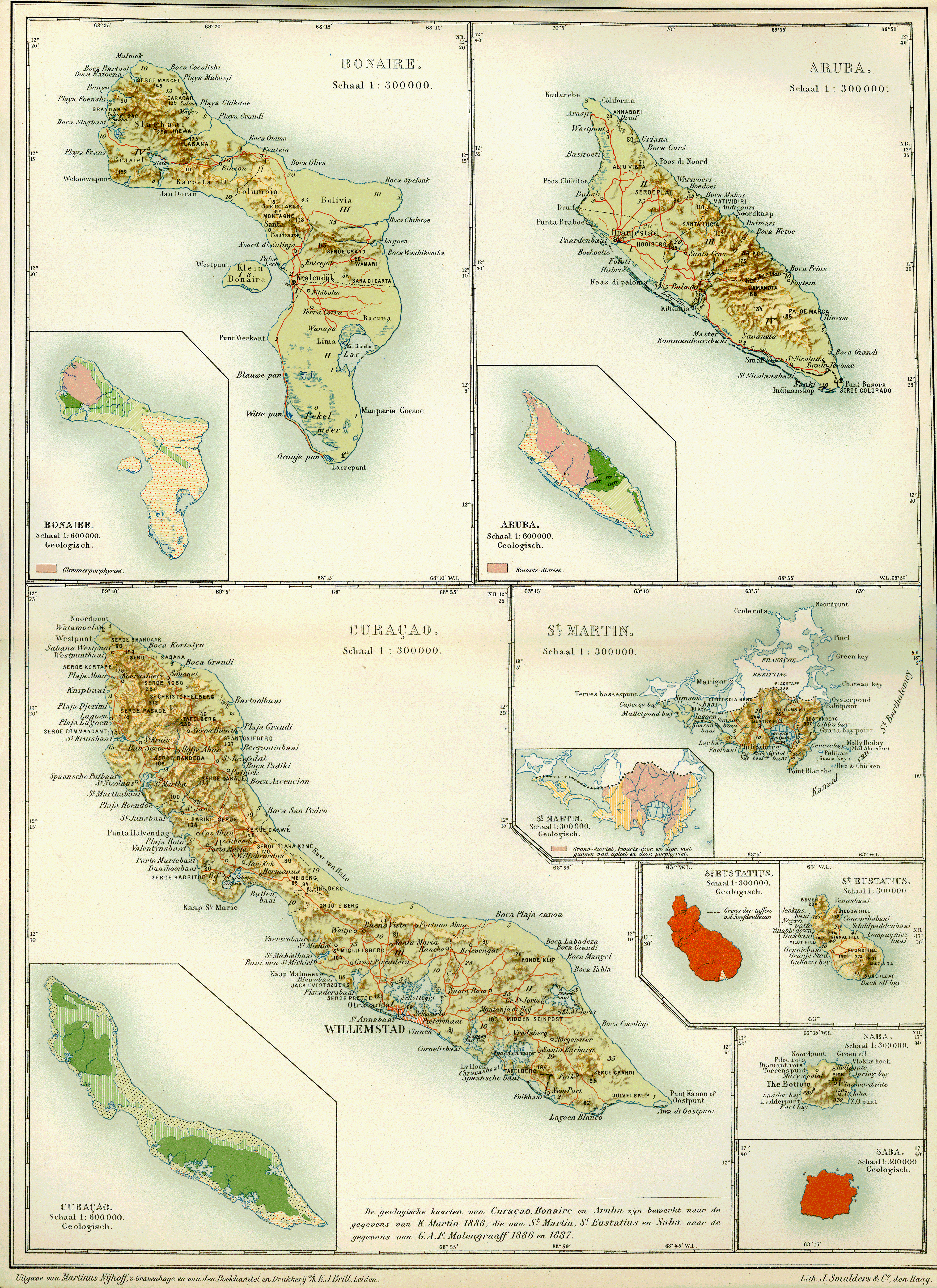 Kaart II, behoorende bij de Encyclopaedie van Nederlandsch West-Indië. Curaçao, Bonaire, Aruba, St. Martin, St. Eustatius, Saba (part 2)